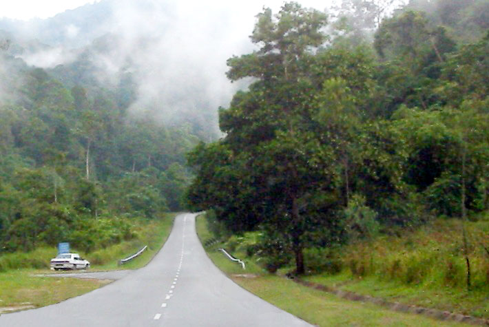 Jalan ke lenggung. Dari Wikipedia Inggeris